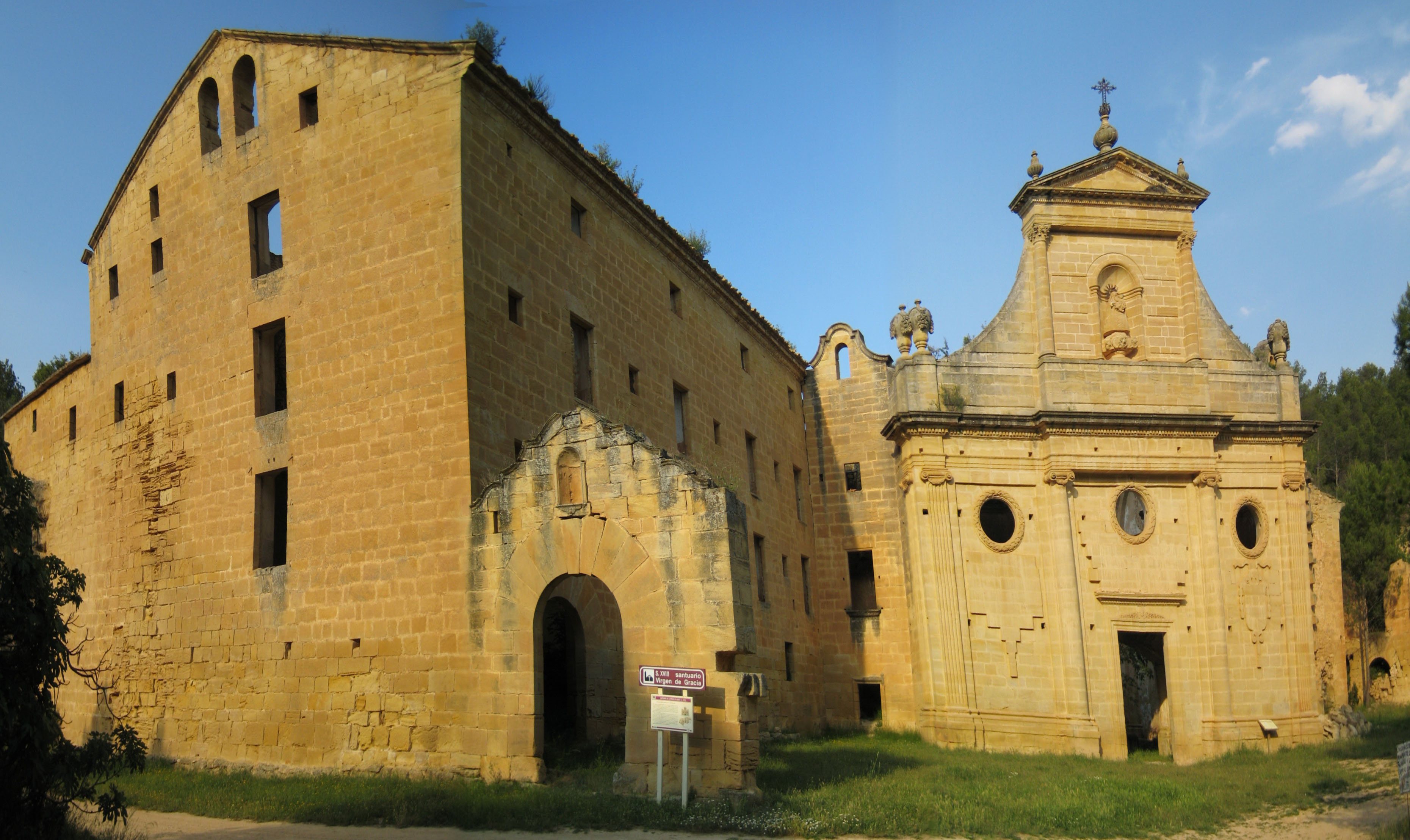 Se trata de un conjunto de edificios del s.XVIII, algunos de los cuales están excavados en la roca. En la actualidad destacan los volúmenes de la iglesia y la hospedería, ya que el resto de las construcciones prácticamente han desaparecido debido al gran deterioro que ha sufrido el conjunto. De la hospedería, de planta rectangular, cuatro alturas y gran sobriedad constructiva, apenas se conservan los muros de carga mientras que de la iglesia se mantienen los muros perimetrales, de los que se deduce que se trataba de un edificio de tres naves y cabecera recta, tras la cual se desarrollaba el Camarín de la Virgen. La fábrica de la hospedería es de cantería mientras que la de la iglesia es de mampostería, reservándose la cantería sólo para la fachada, estructurada en dos cuerpos, el inferior de tres calles y orden jónico y el superior de una calle y orden corintio, la transición entre ambos se realiza mediante grandes volutas, rematándose la fachada con un frontón triangular. Del interior sólo se sabe que estaba decorado en estilo barroco clasicista y que iba cubierto probablemente mediante bóvedas de cañón con lunetos.